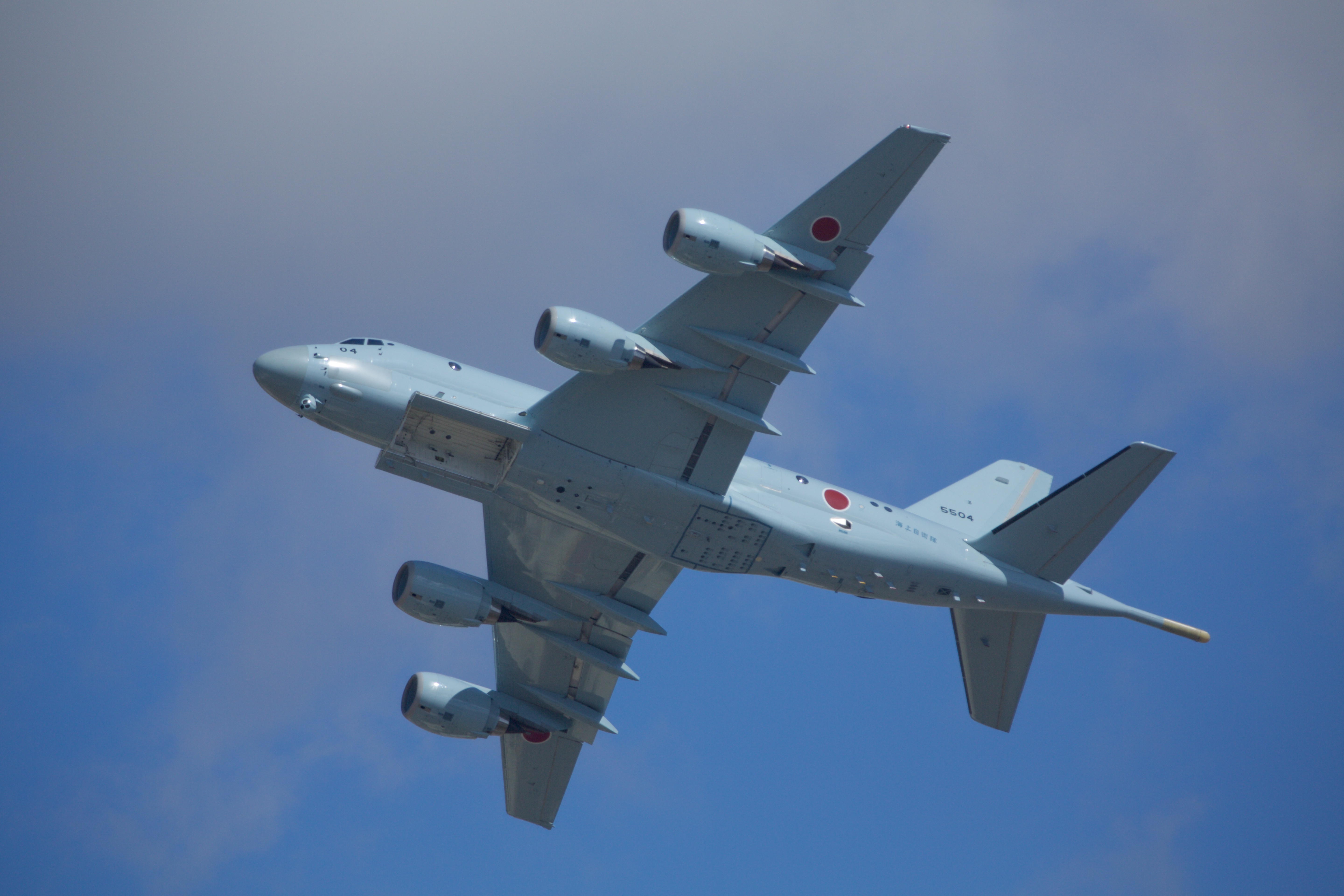 Kawasaki P-1